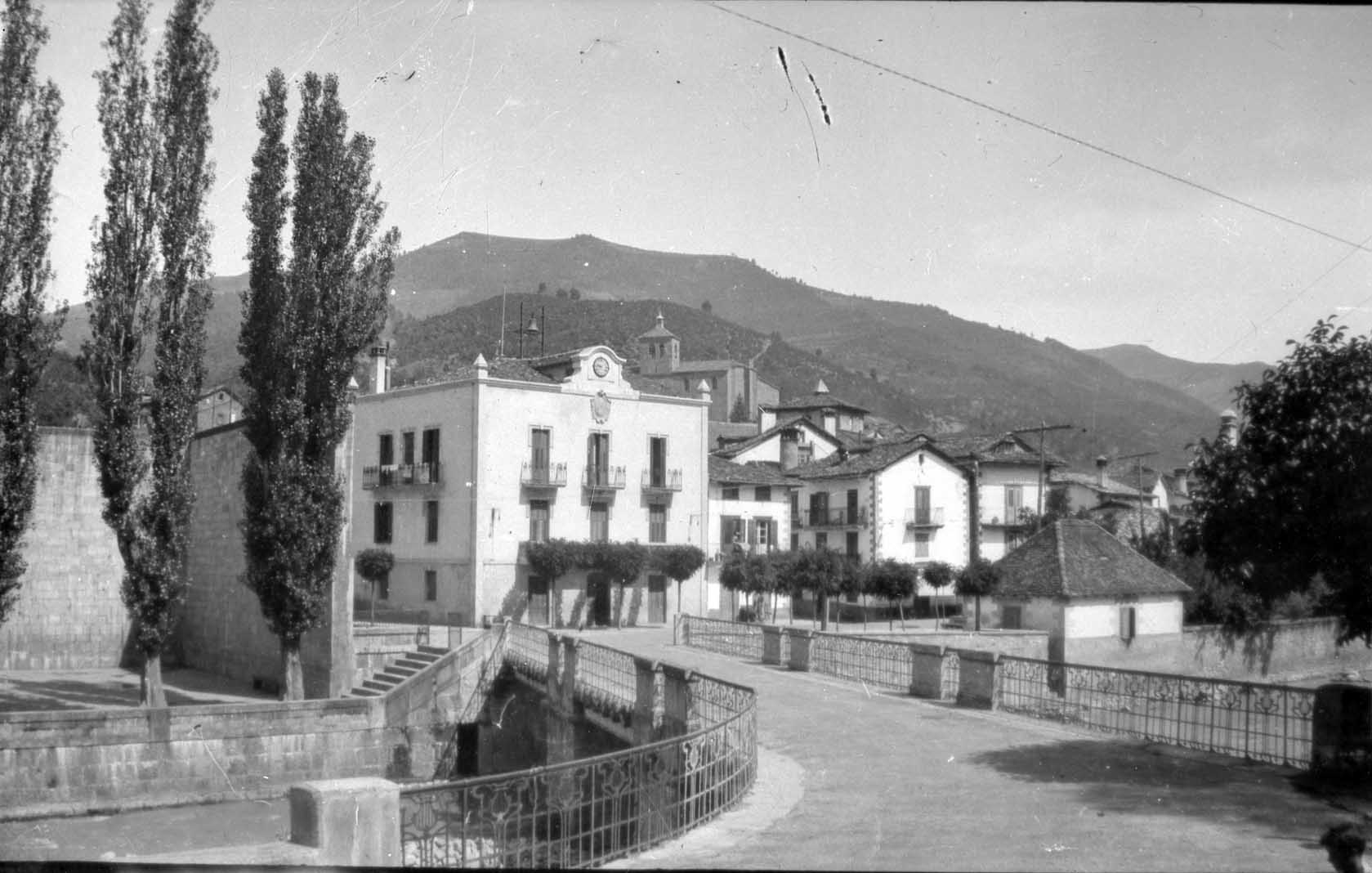 Erronkariko udaletxea.